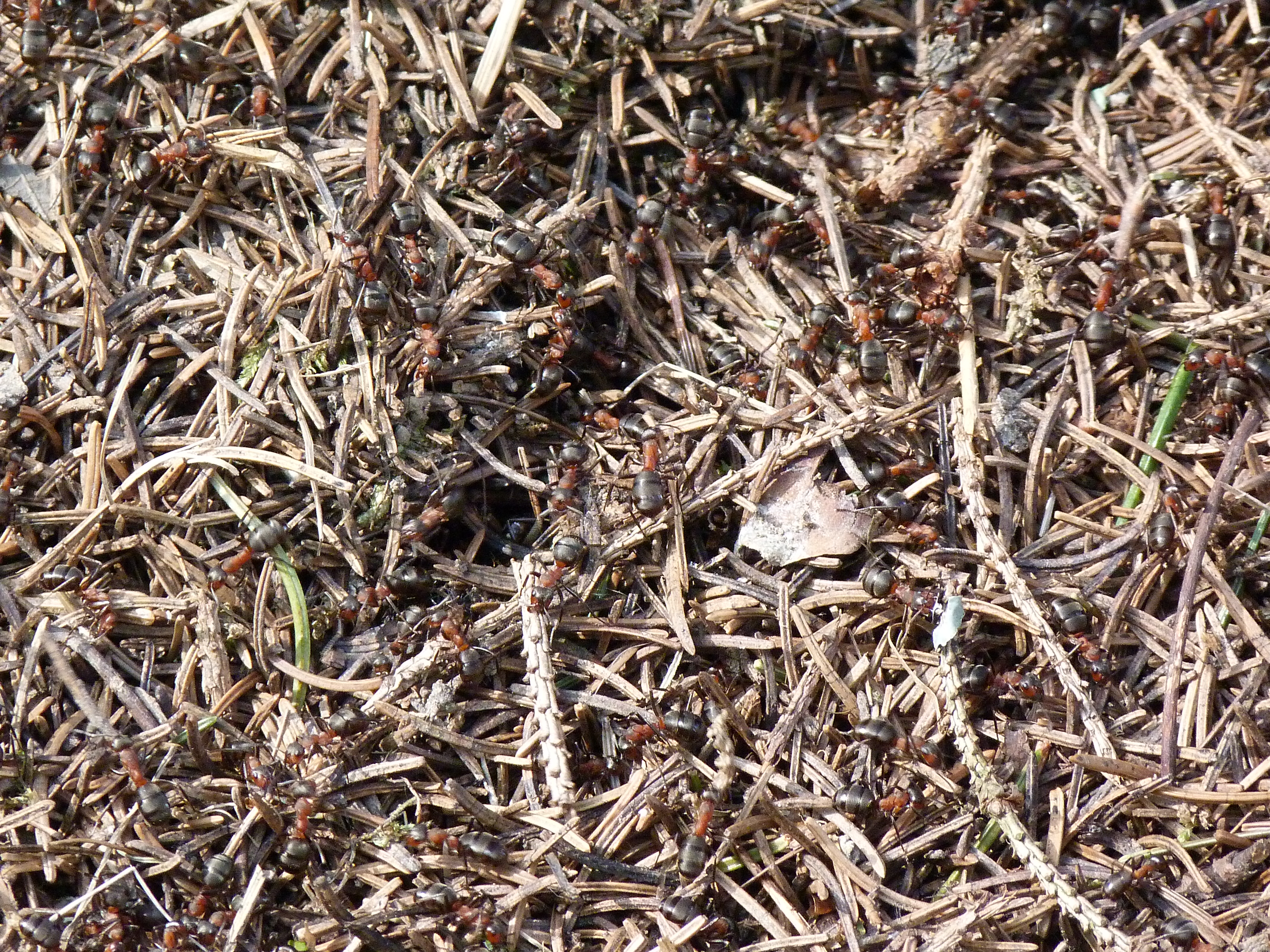 A felvétel 2015. március 26-án készült Őriszentpéteren. Hangyák. ©© Derzsi Elekes Andor, Budapest, 2015, A fénykép másolását és felhasználását a szerző ellenérték nélkül, jogutódjaira is kihatóan megengedi. Az engedély kiterjed a kereskedelmi célú hasznosításra is. Kéri azonban nevének feltüntetését a felhasználás során. A Metapolisz sorozat valamennyi képe és filmje Creative Commons alatti. kereskedelmi - for profit - célra is felhasználható. Ajánlott hivatkozás: Derzsi Elekes Andor: Metapolisz DVD line